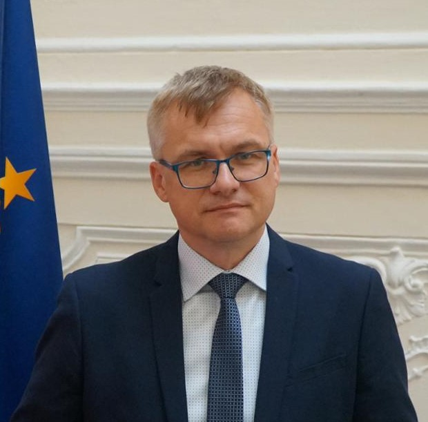 Grzegorz Ślubowski, Konsul Generalny RP w Petersbugu